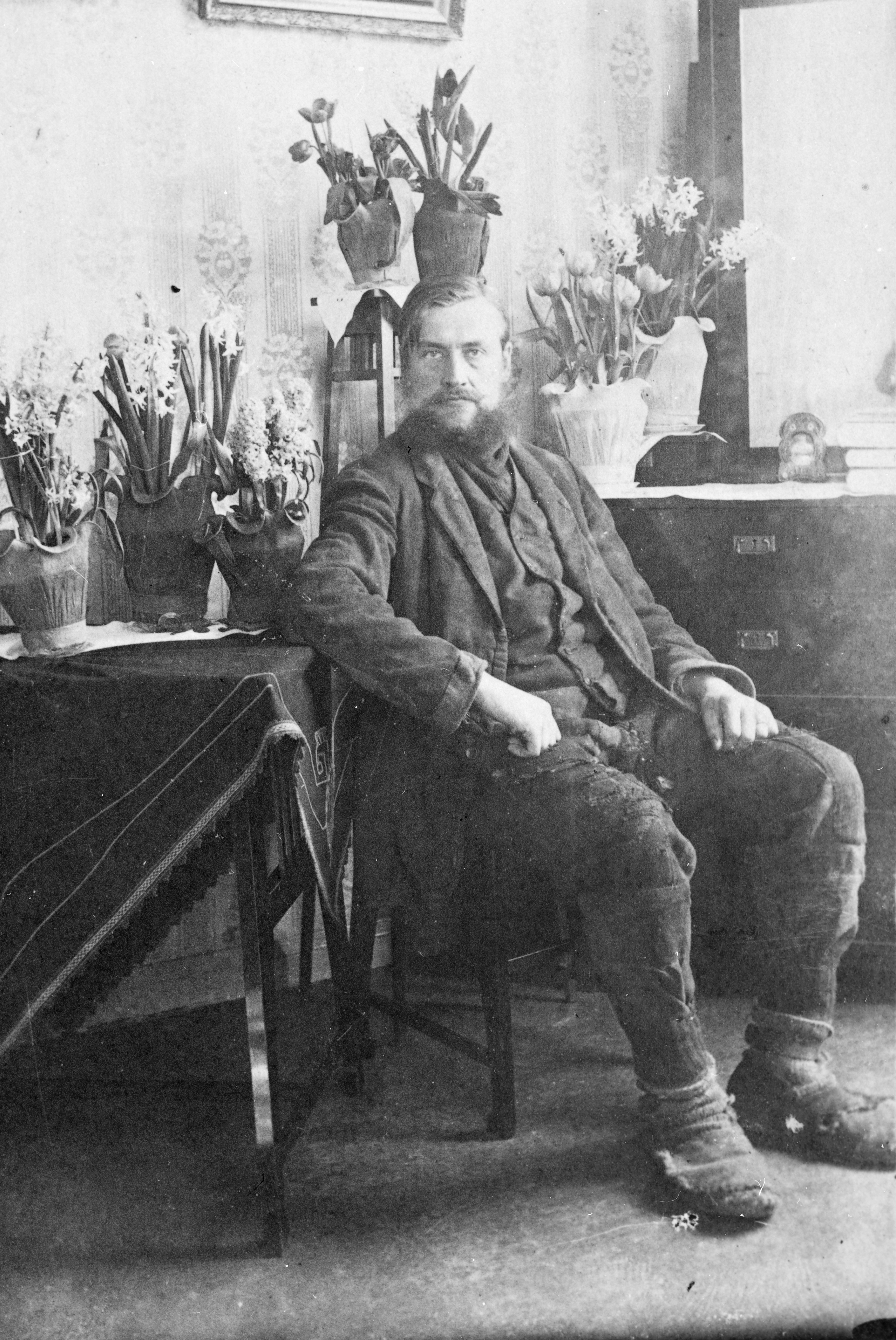 Salomo Savolainen päästyään punavankeudesta vuonna 1918